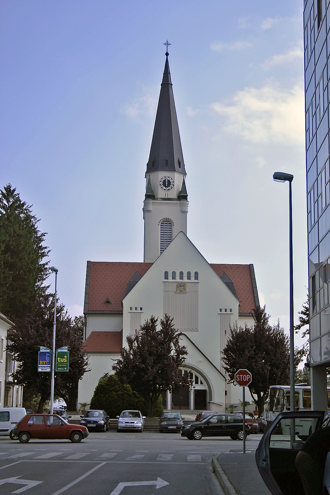 Stolnica svetega Nikolaja, Murska Sobota. Saint Nicholas cathedral, Murska Sobota. Heiliger Nikolaus Domkirche, Murska Sobota.